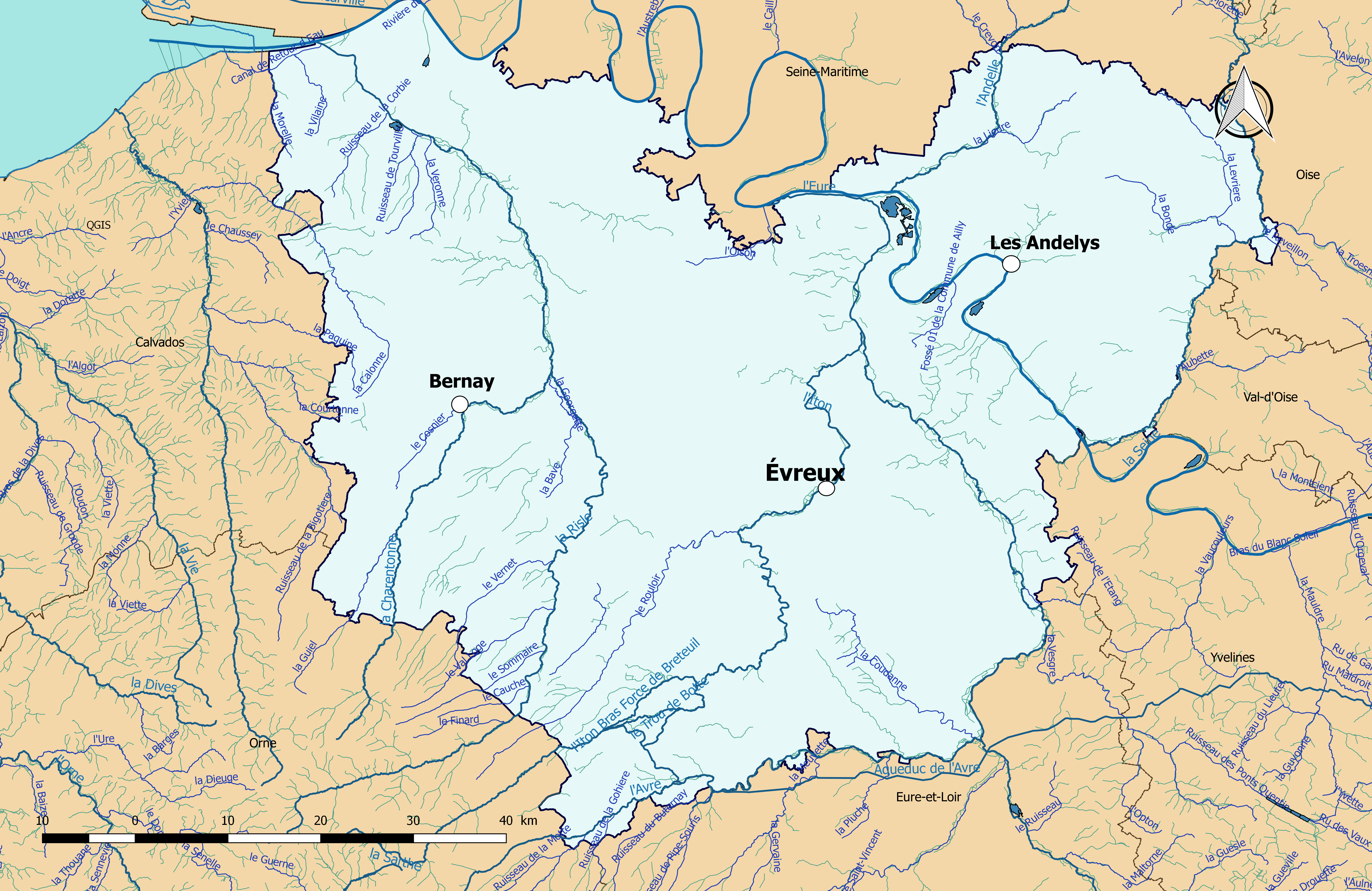 Carte du réseau hydrographique complet du département de l'Eure (France).